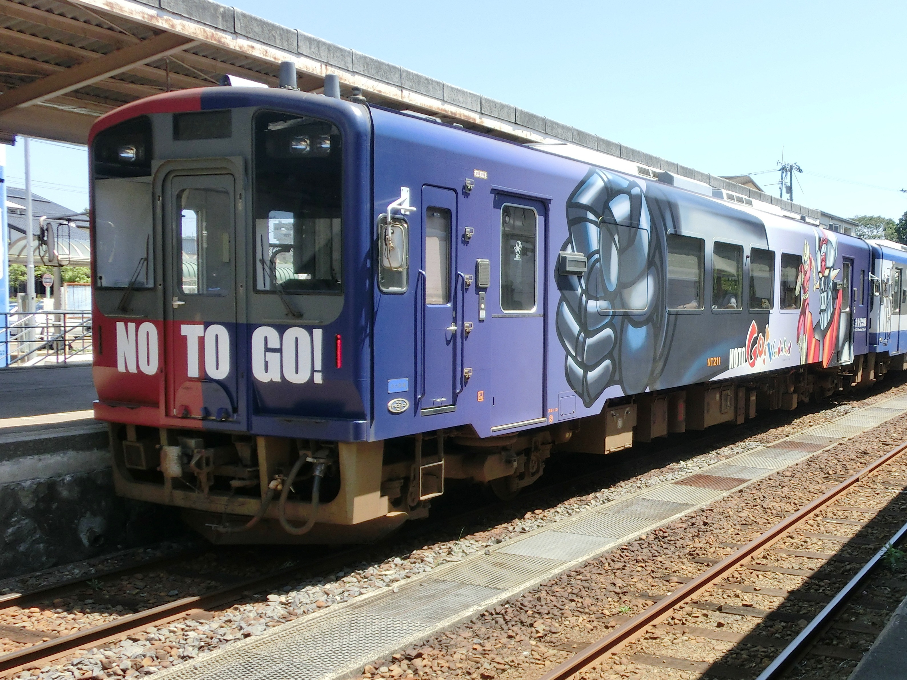 のと鉄道NT200形気動車のNT211号車。永井豪のキャラクターが描かれたラッピング車両。穴水駅にて撮影。